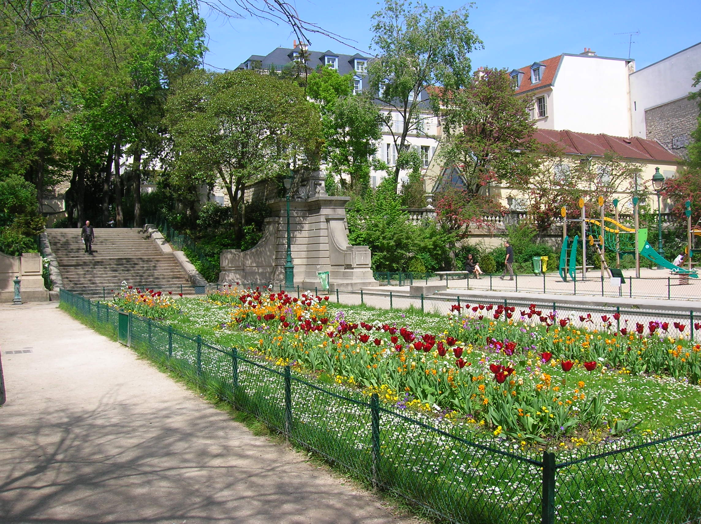 Square Capitan des Arènes de Lutèce